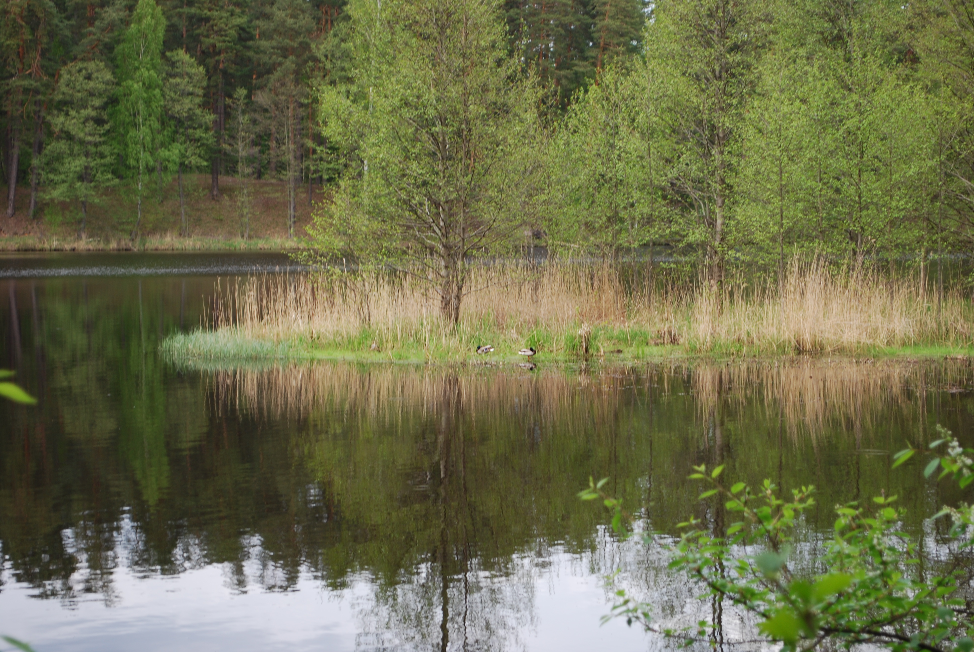 Beberbeķu ezers, sala